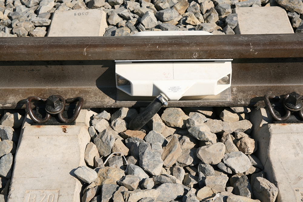 Ein Achszähler von Siemens im eingebauten Zustand, Empfänger.